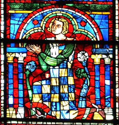 Petr z Dreux